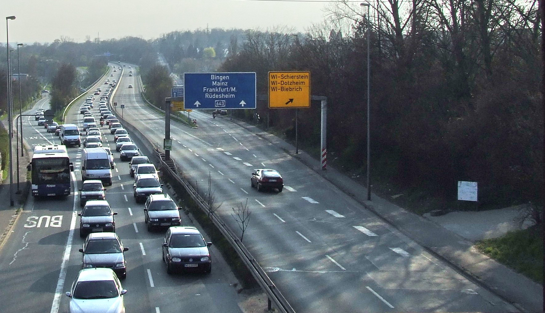 Beginn der Bundesautobahn 643 in Wiesbaden